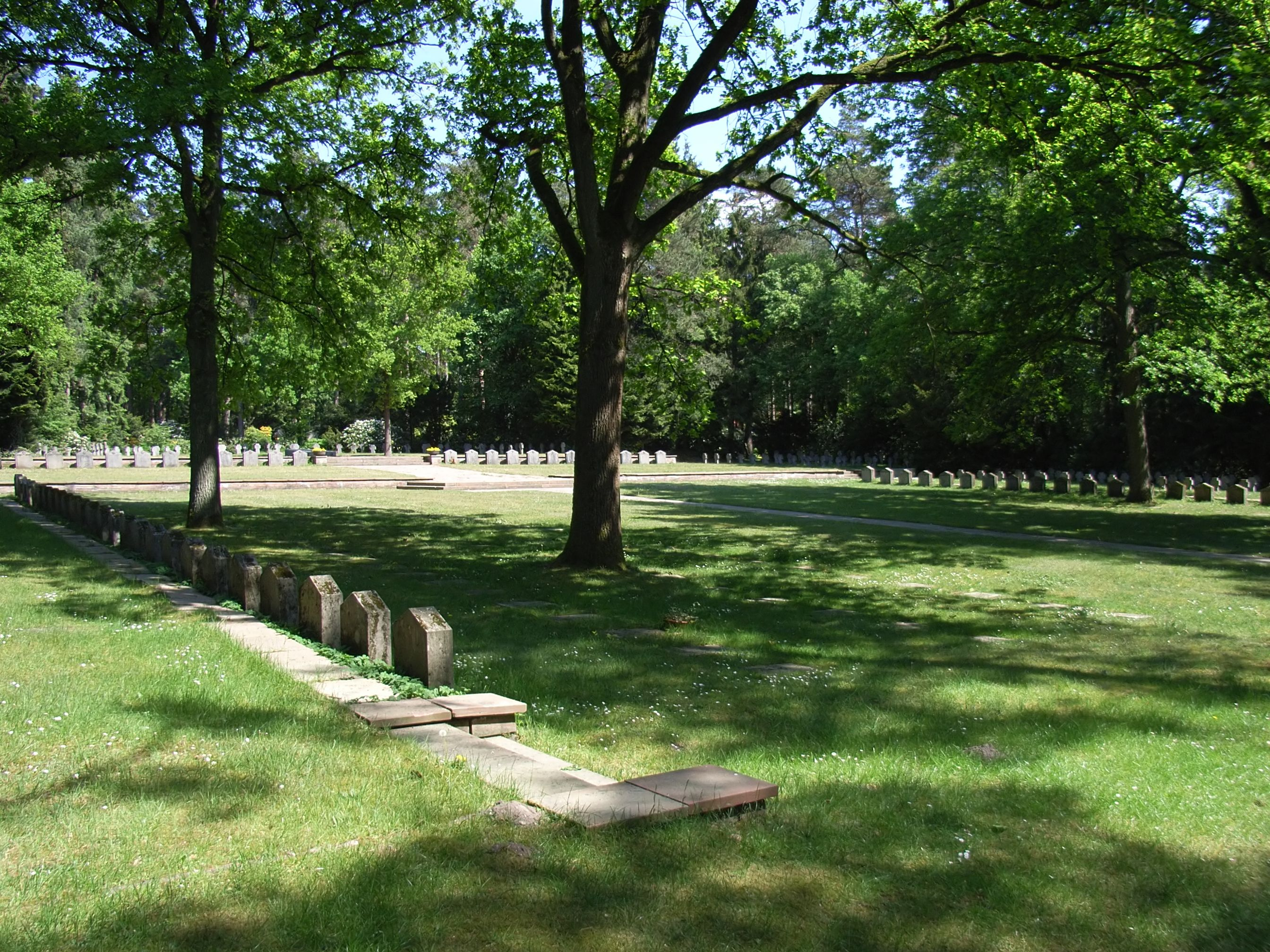 Bielefeld, Deutschland: Kriegsgräberstätte auf dem Sennefriedhof